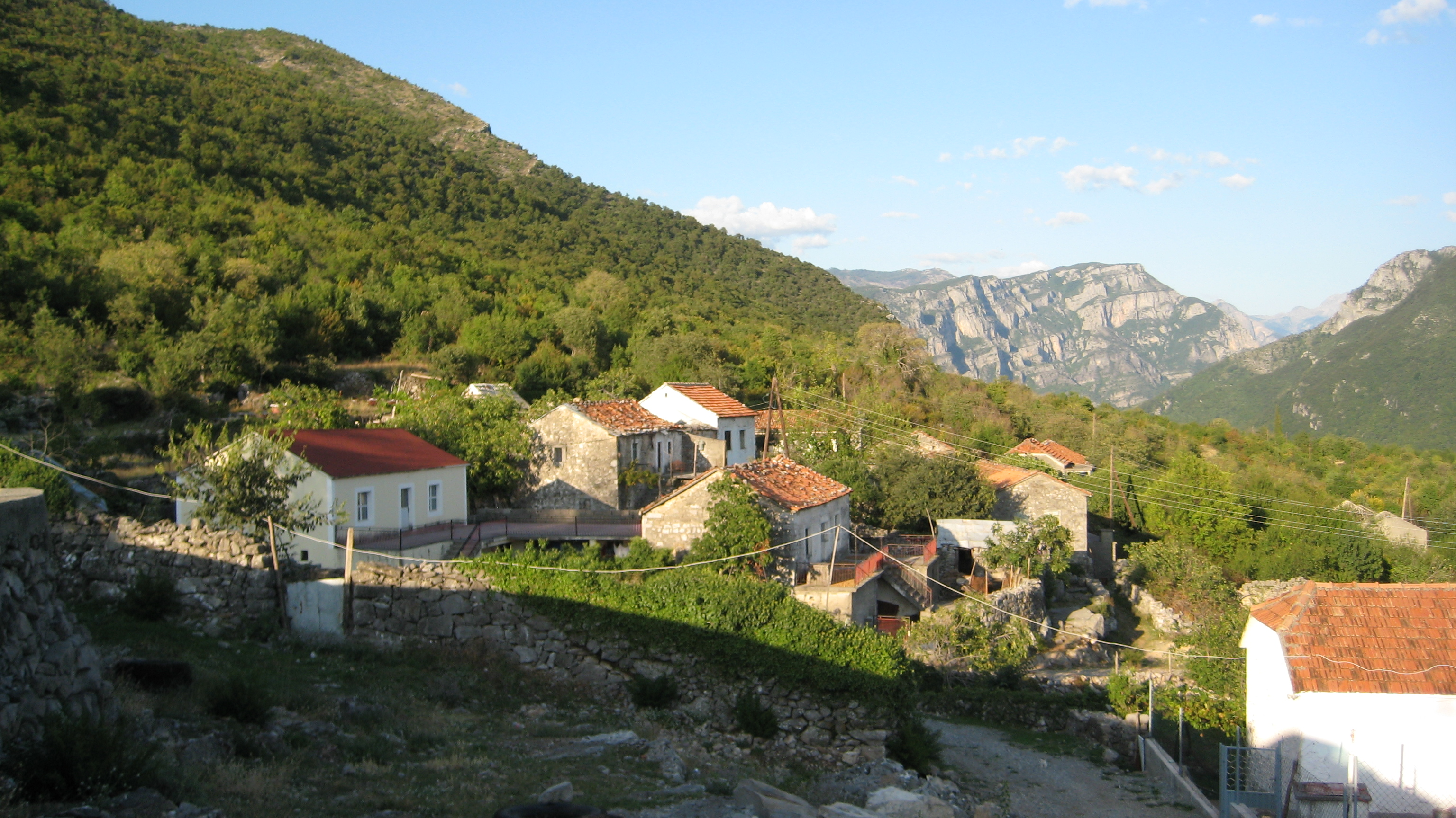 Seliste, Montenegro, Crnu Goru